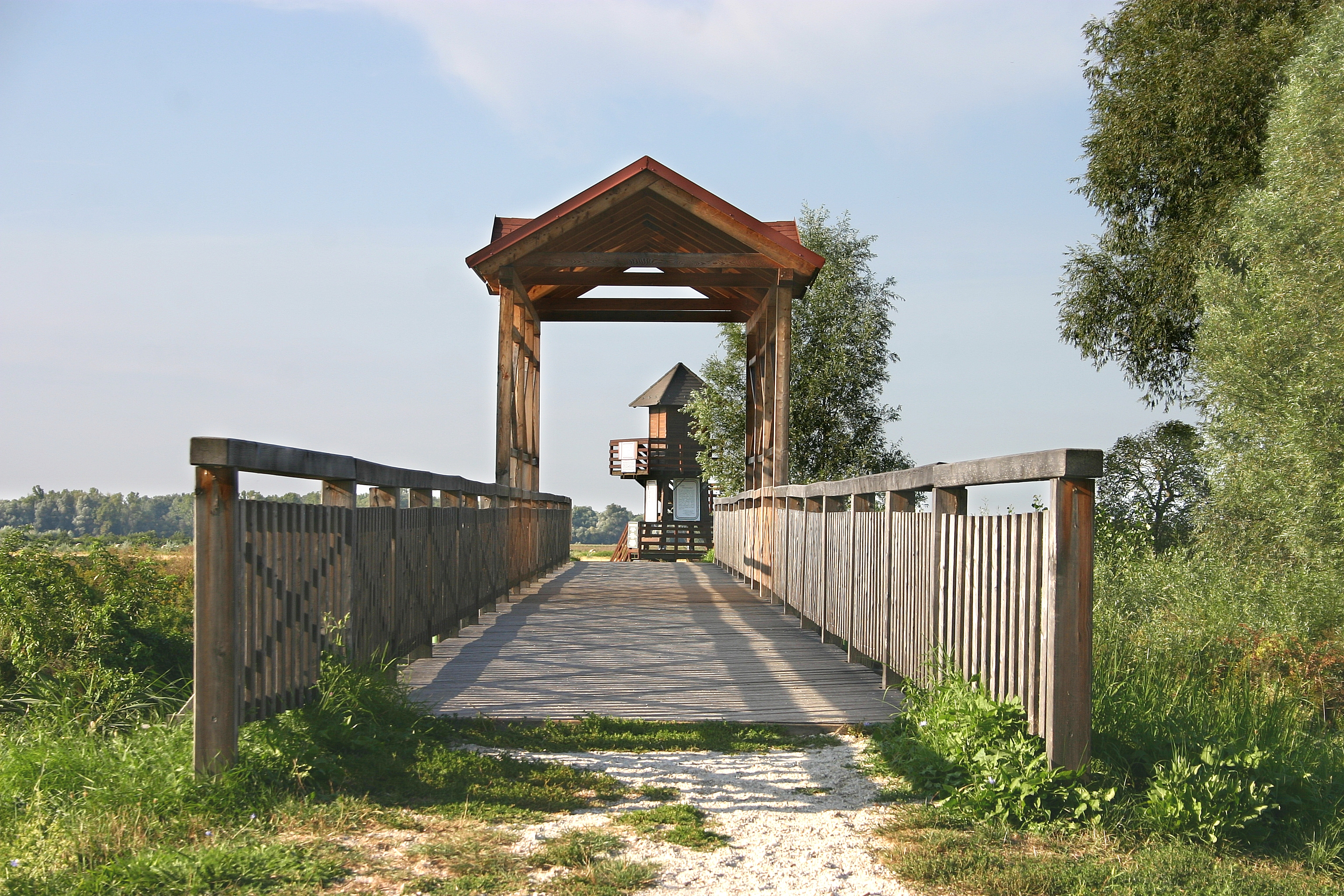 Andau – Brücke von Andau mit dem Einser-Kanal, Durchsicht von Ungarn nach Österreich (Originalschauplatz für den Film Der Bockerer III)